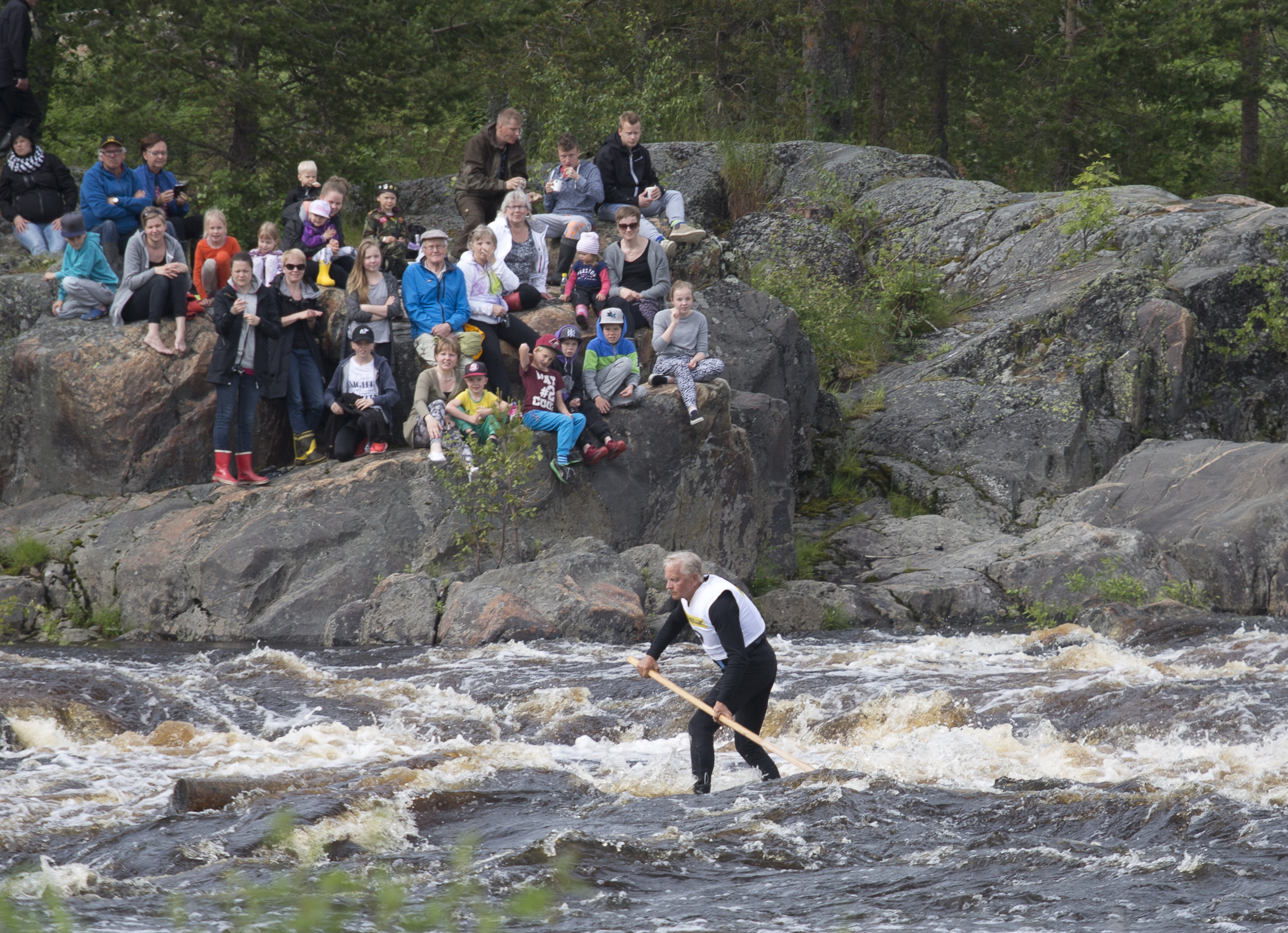 Tukkilaiskisat Raasakkakoskella Iijoella 4.7.2015